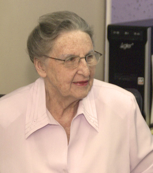 Jūratė Statkutė de Rosales